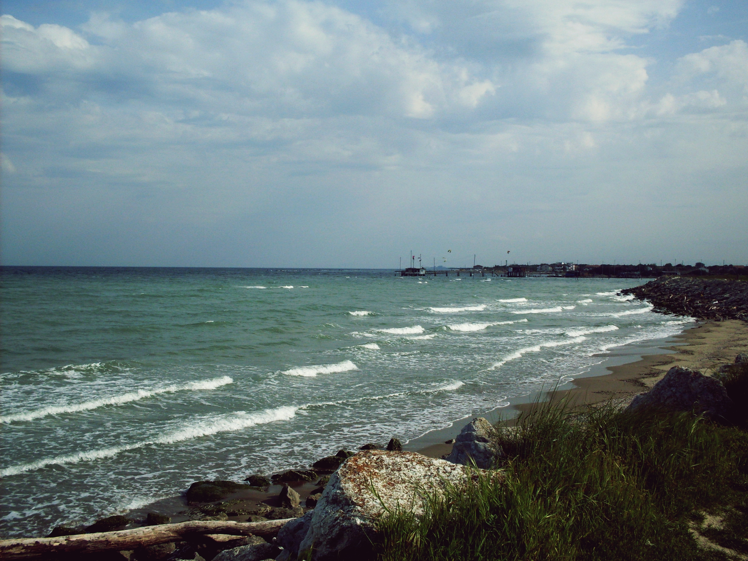 la costa di lido adriano verso lido di dante